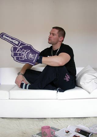 Ein typisches Philipp-Tingler-Portrait von Stefan Sulzer